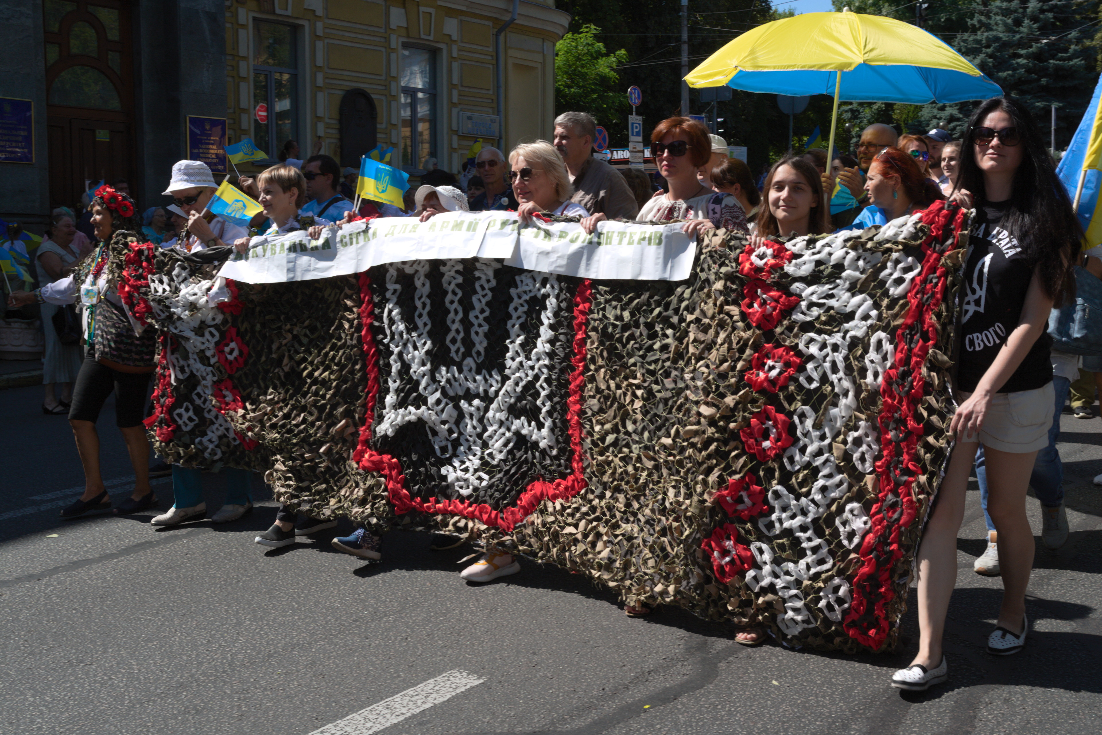 Волонтери на Марші захисників України на День Незалежності, Київ, 24 серпня 2019 року.